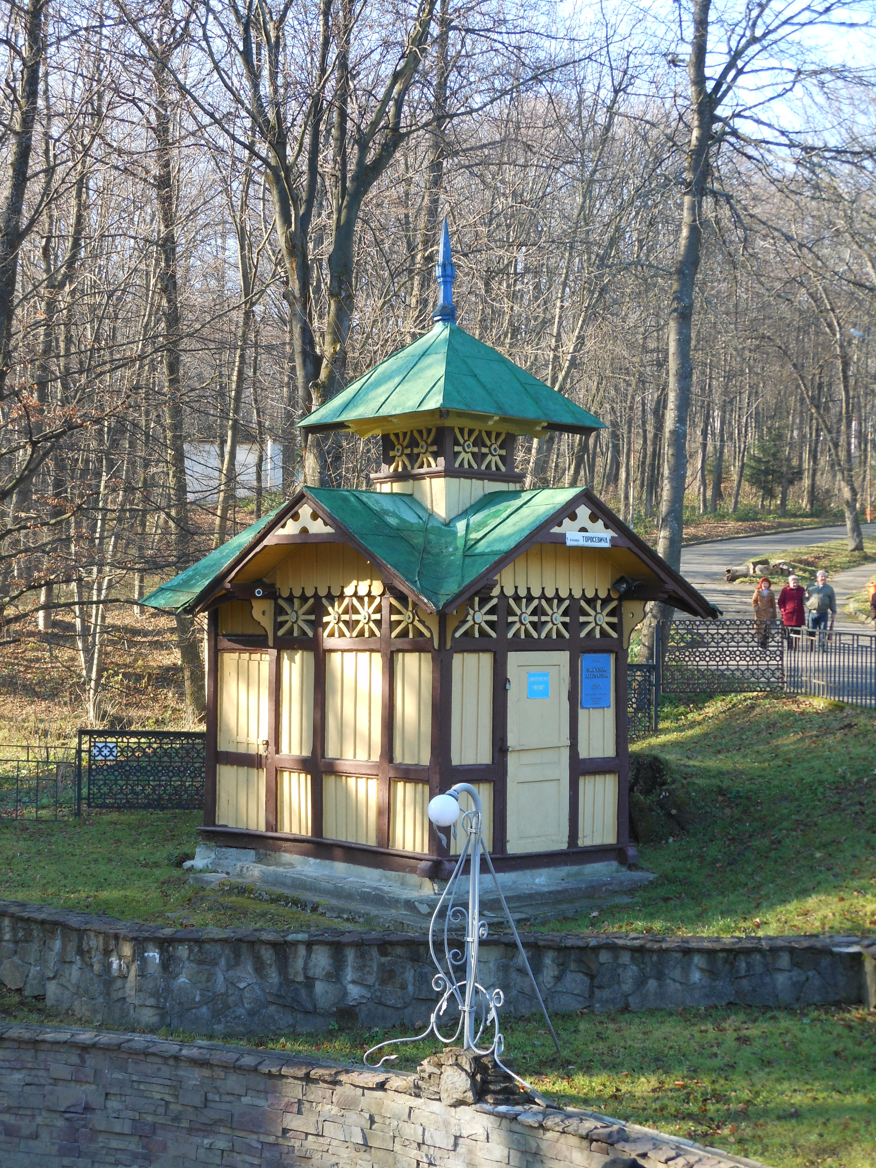 Джерело № 11 (колишня «Юзя») курорту «Трускавець», м. Трускавець